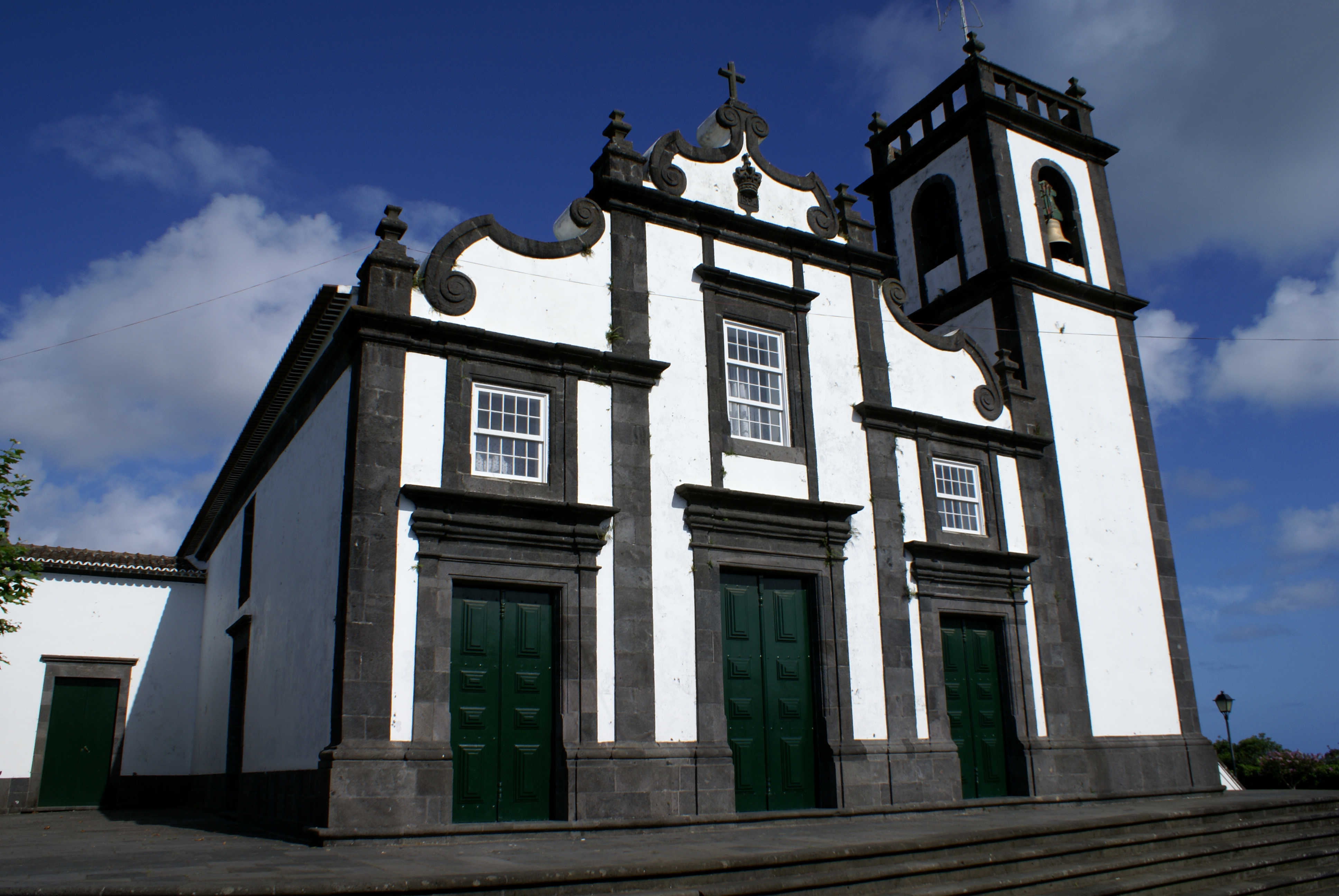 Igreja de Nossa Senhora dos Prazeres, Pico da Pedra, ilha de São Miguel, Açores